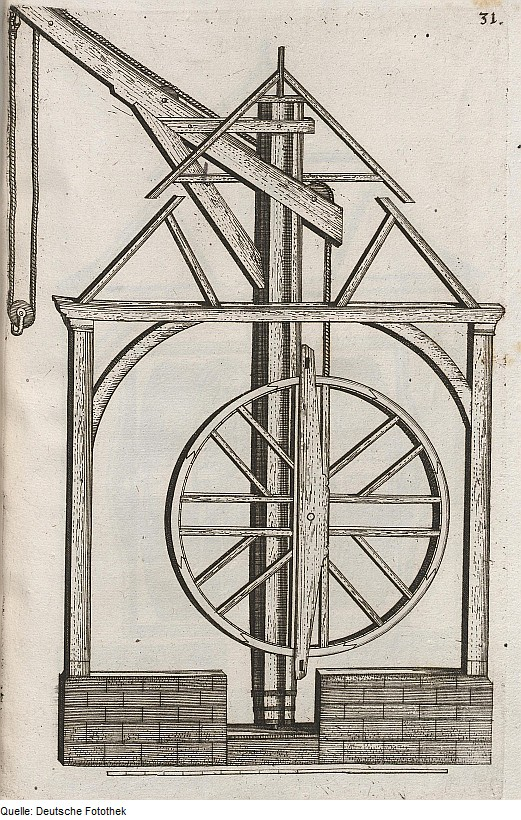 Original image description from the Deutsche Fotothek Kran